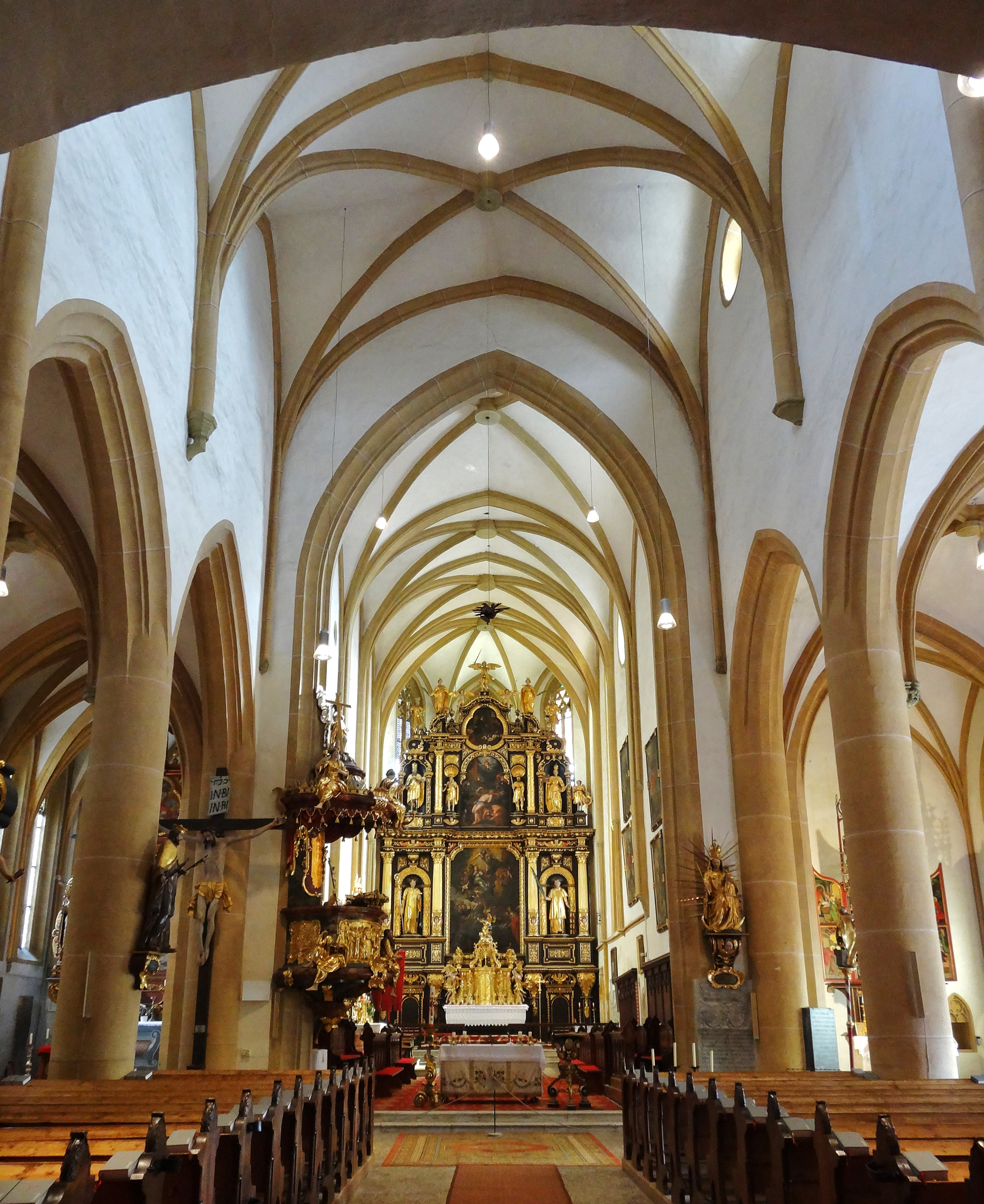 Kath. Pfarrkirche St. Leonhard im Lavanttal, Innenansicht